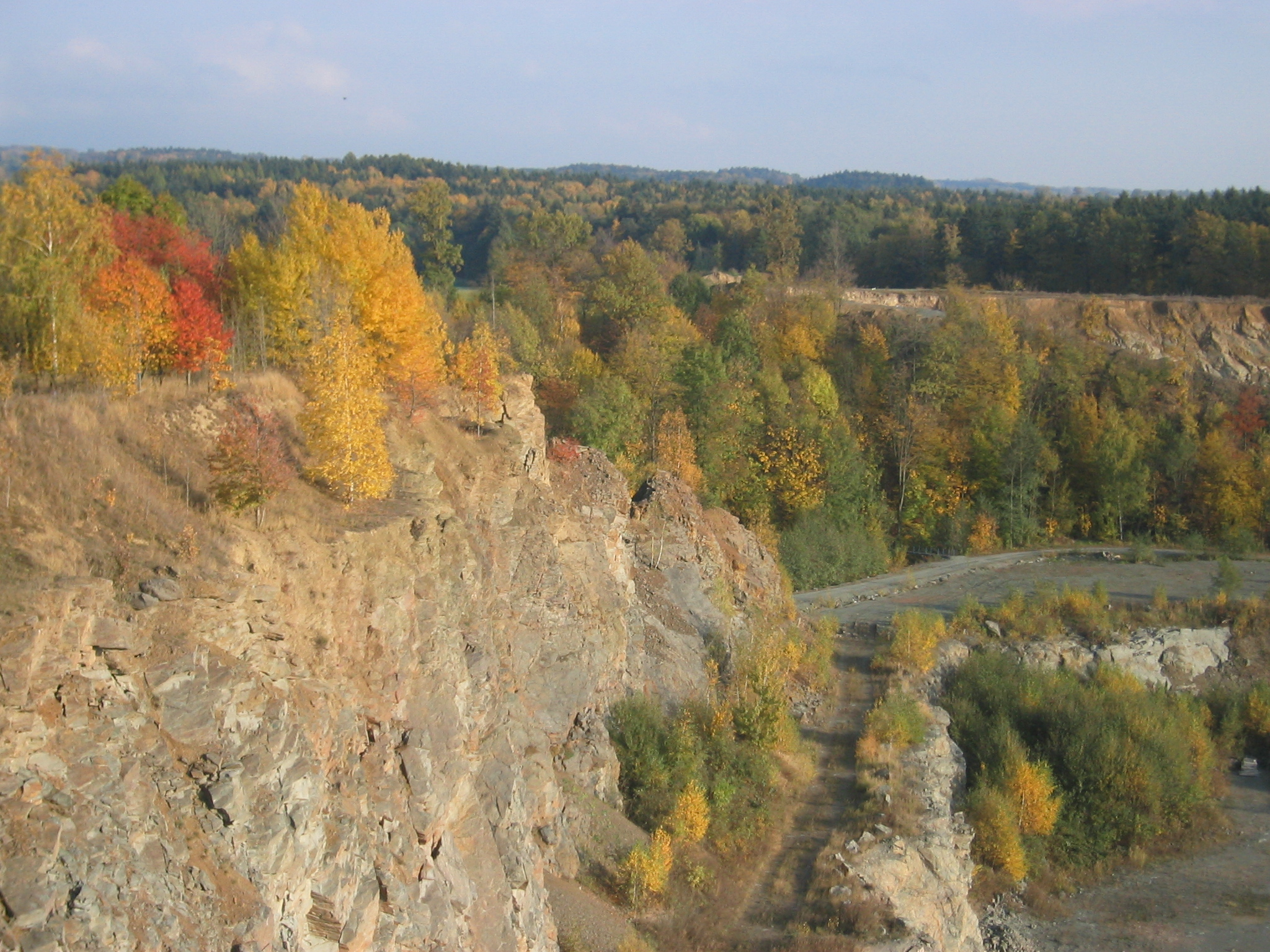 Lom Masty - podzimní motiv